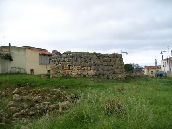 Ossi - Nuraghe Sa Mandra 'e sa Giua